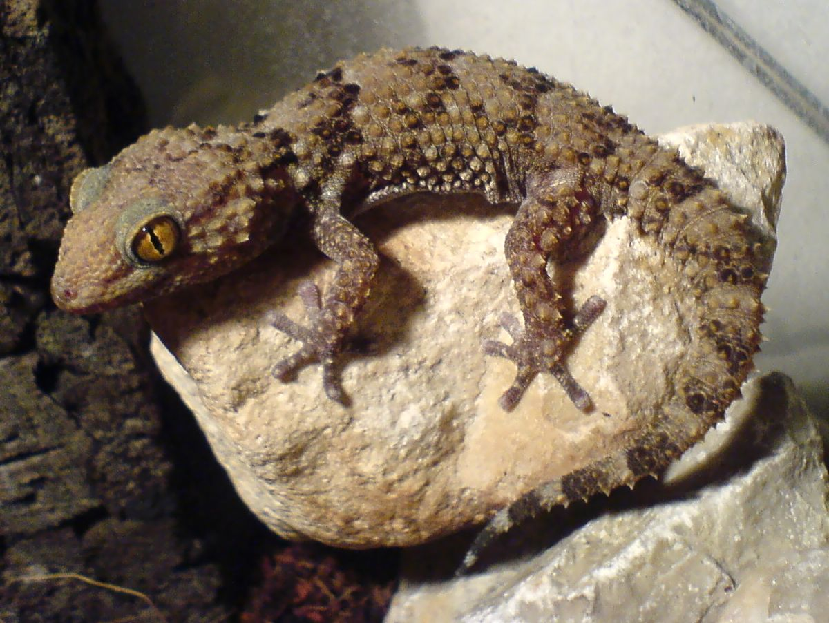 Pachydactylus bibronii